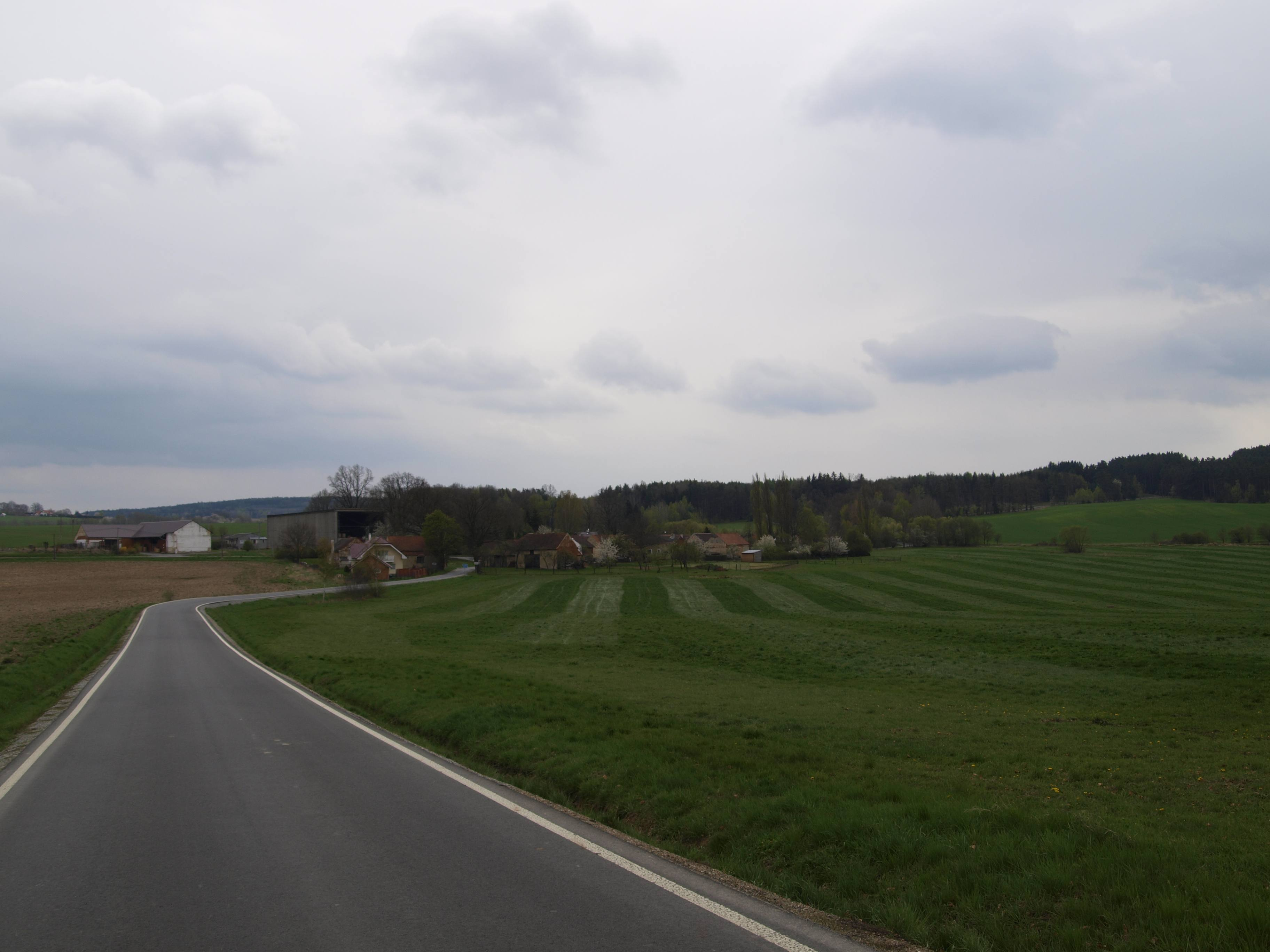 Němčice, část obce Meclov v okrese Domažlice, pohled ze silnice 19360 vedoucí sem z obce Mračnice